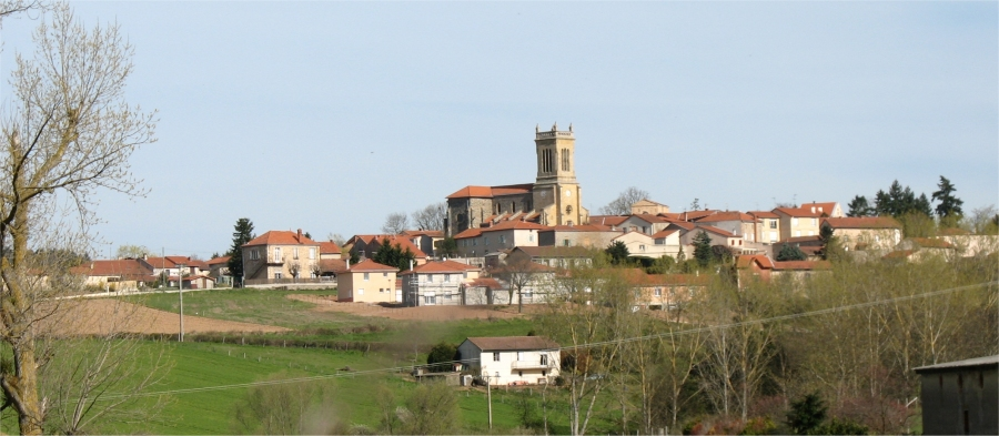 Cordelle (Loire, France) - vue générale